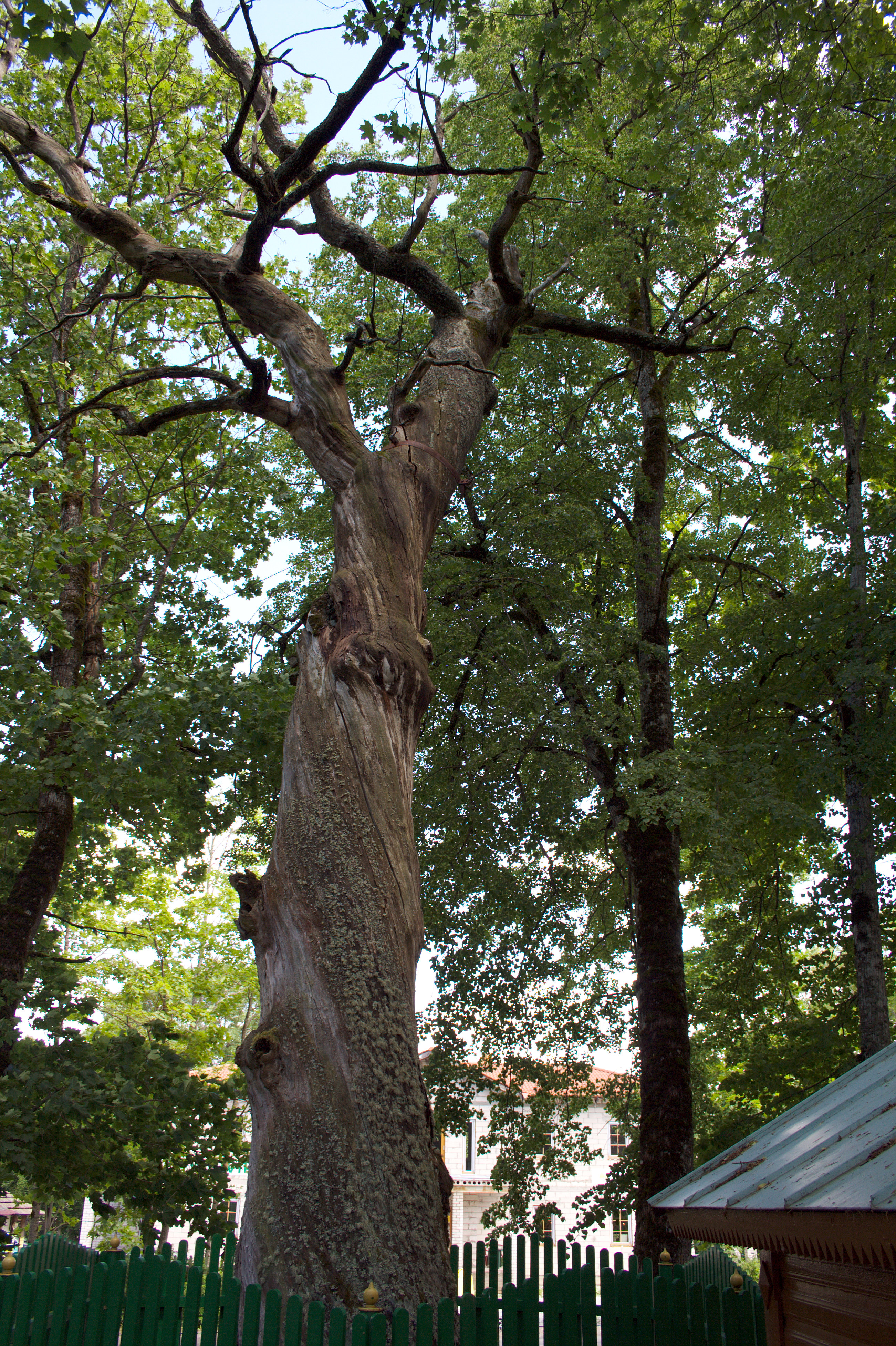 Püha tamm